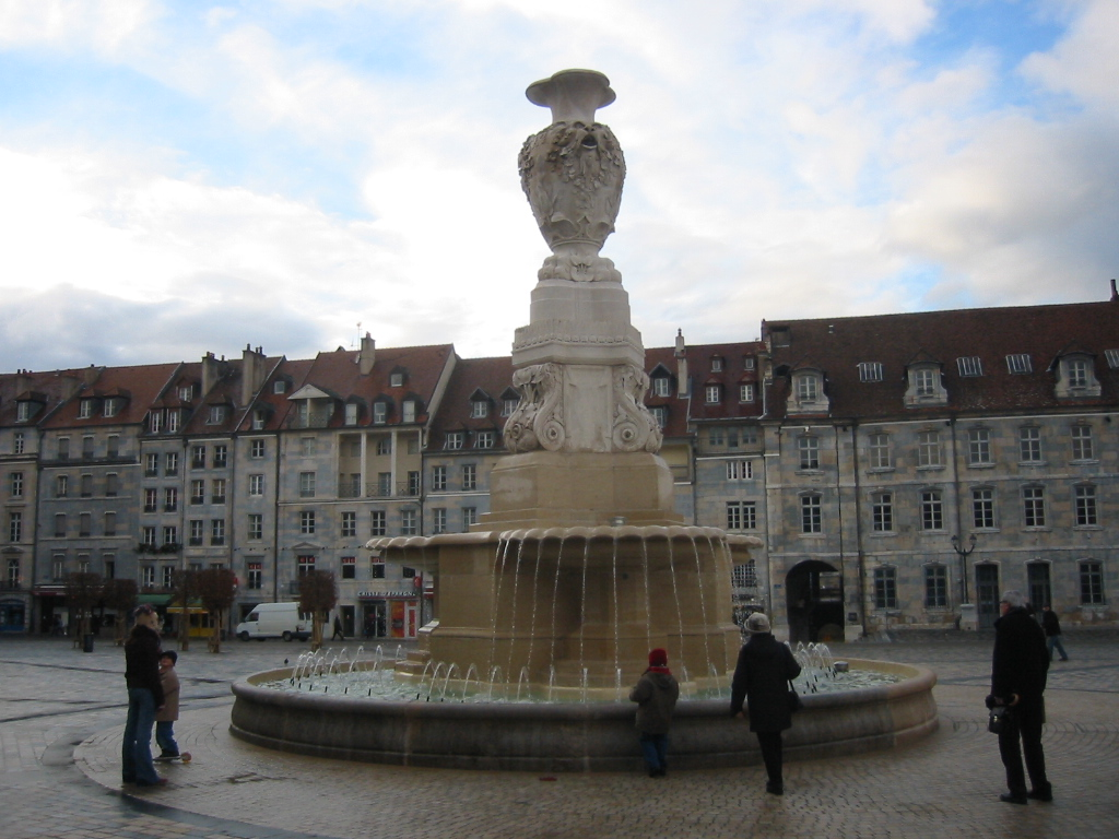 Grande fontaine de Besançon, au milieu de la Place de la Révolution.